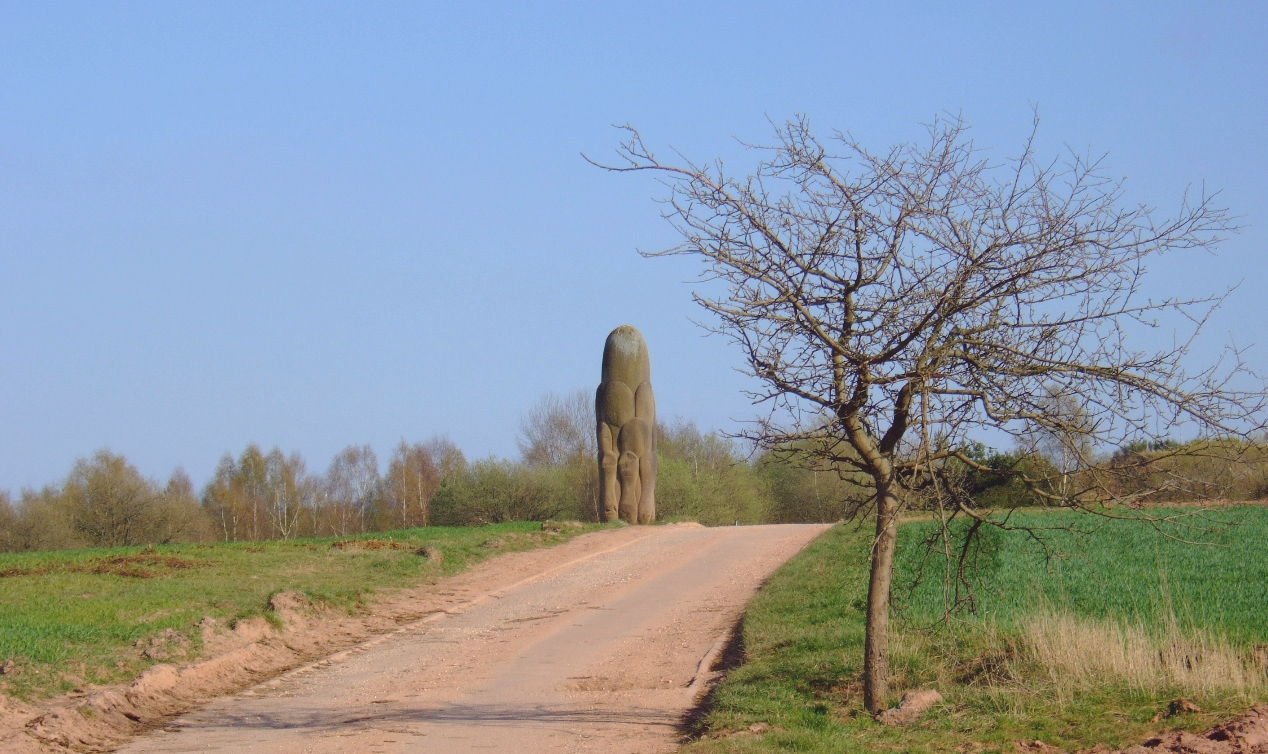 Teil der Skulpturenstraße bei Namborn. Straße der Skulpturen (St. Wendel). Franz Xaver Ölzant: Wolkenstein (1979/ bei Namborn). Franz Xaver Ölzant: "Wolkenstein" (Straße der Skulpturen, Teil der Straße des Friedens). Franz Xaver Ölzant: Wolkenstein, 1979.